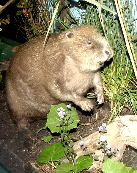 Biber im Braith-Mali-Museum in Biberach an der Riß.